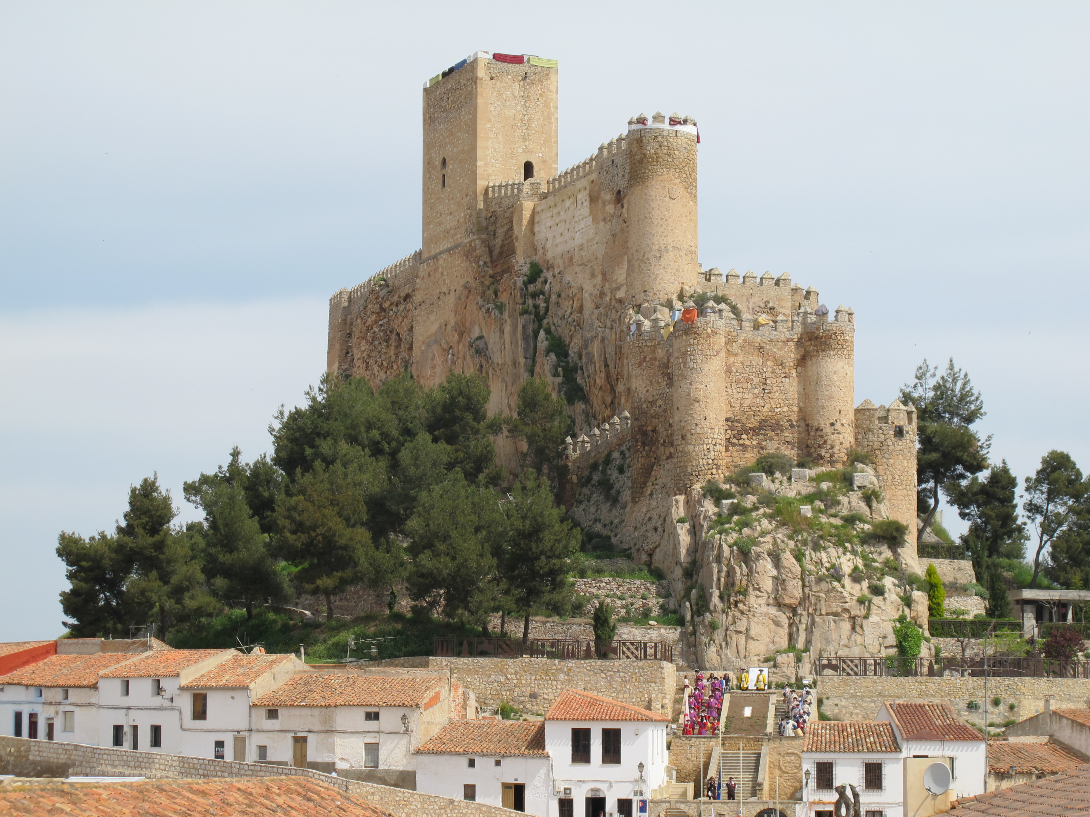 Castillo de Almansa See also: Castles in Spain and Castle.